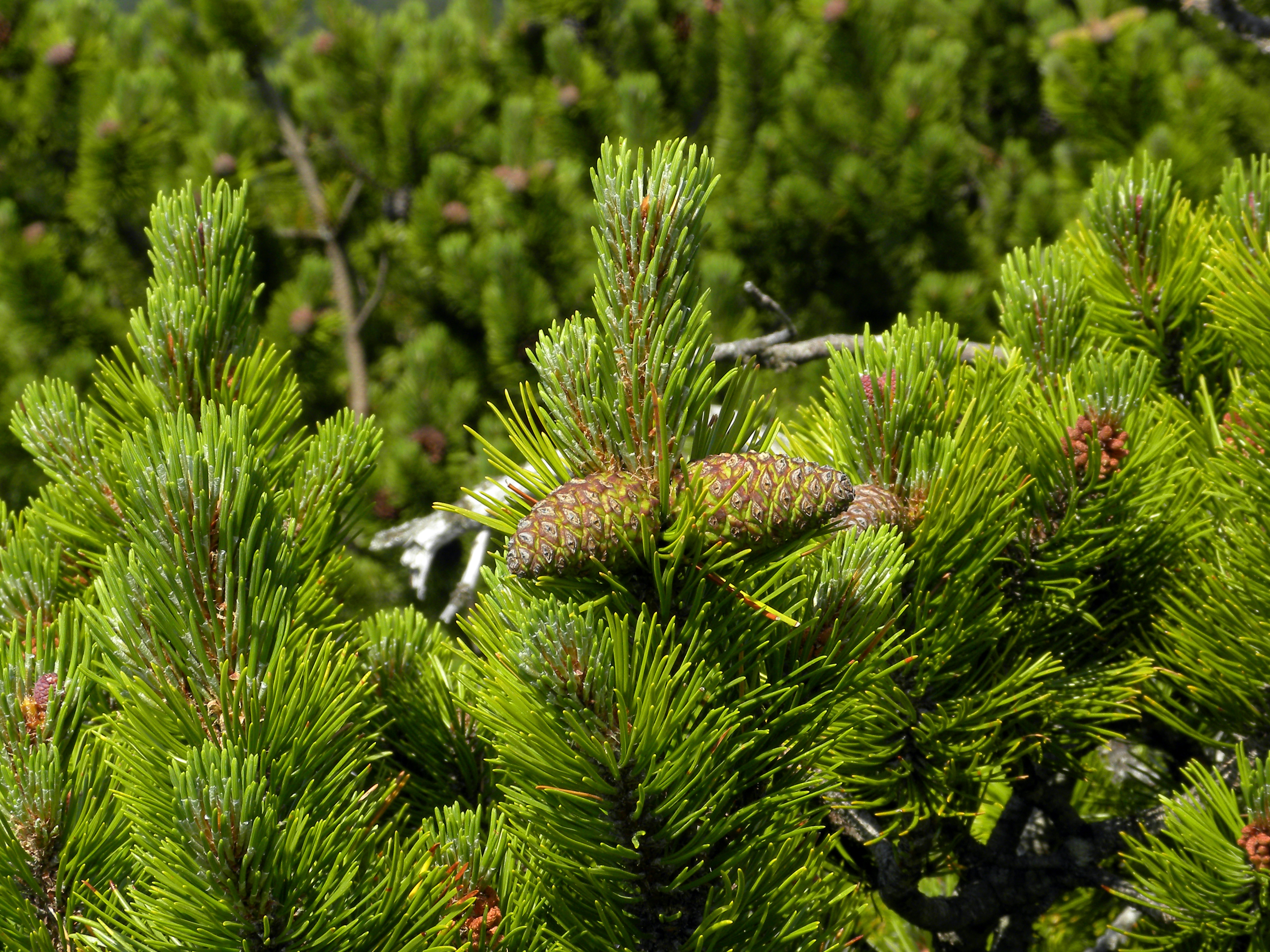 Junge Zapfen der Latschenkiefer (Pinus mugo) auf der Rax